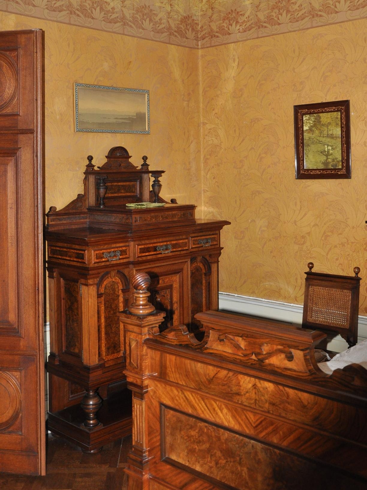 Ansicht eines sich im ursprünglichen Zustand befindenden Schlafzimmer des Schloss Hünegg am Thunersee in der Schweiz im Sommer 2012.